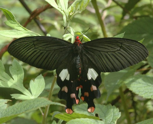 Common Windmill Atrophaneura polyeuctes Family Papilionidae, Lepidoptera